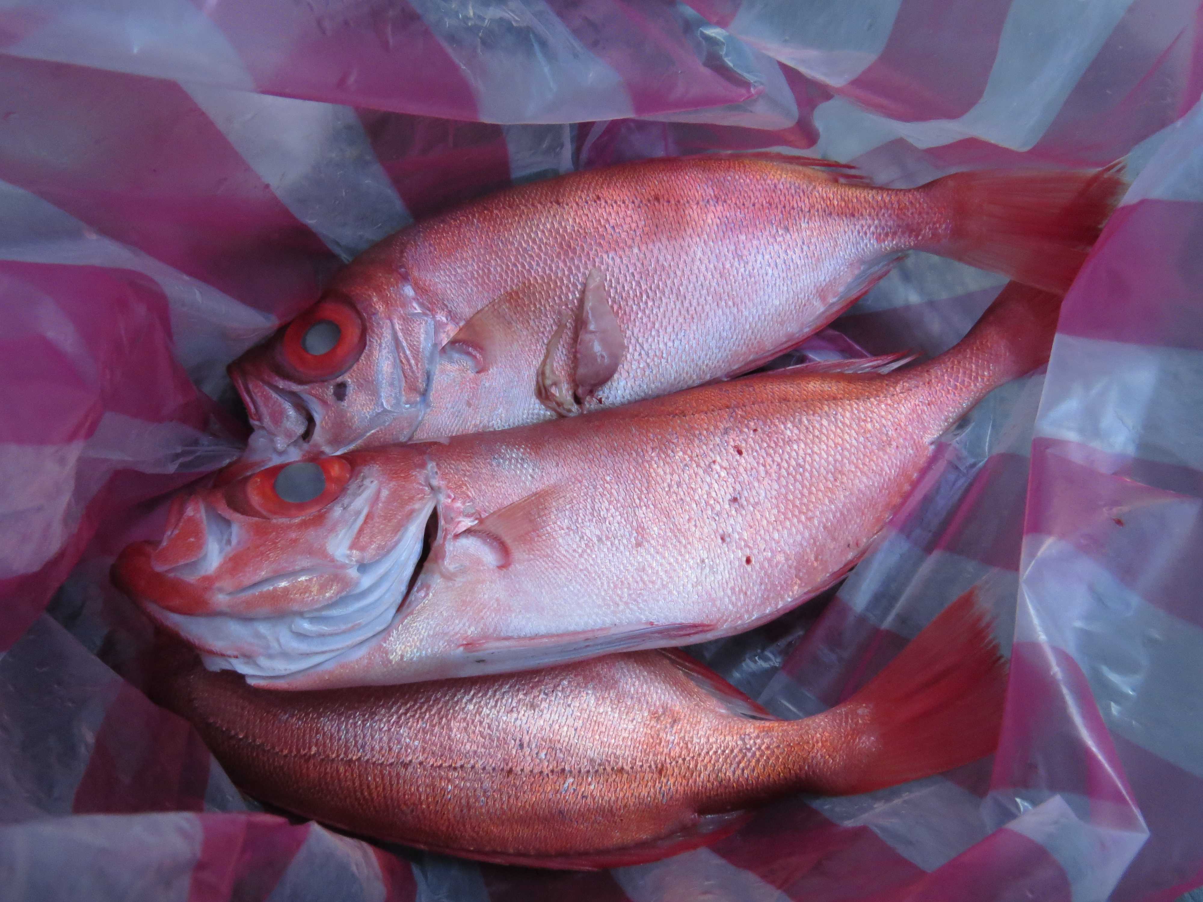 Bân-lâm-gú: 紅目鰱(âng-bak-liân)，學名:Priacanthus macracanthus，佇龜吼漁夫市集翕的。中文（台灣）: 大眼鯛，學名:Priacanthus macracanthus，在龜吼漁夫市集拍的。